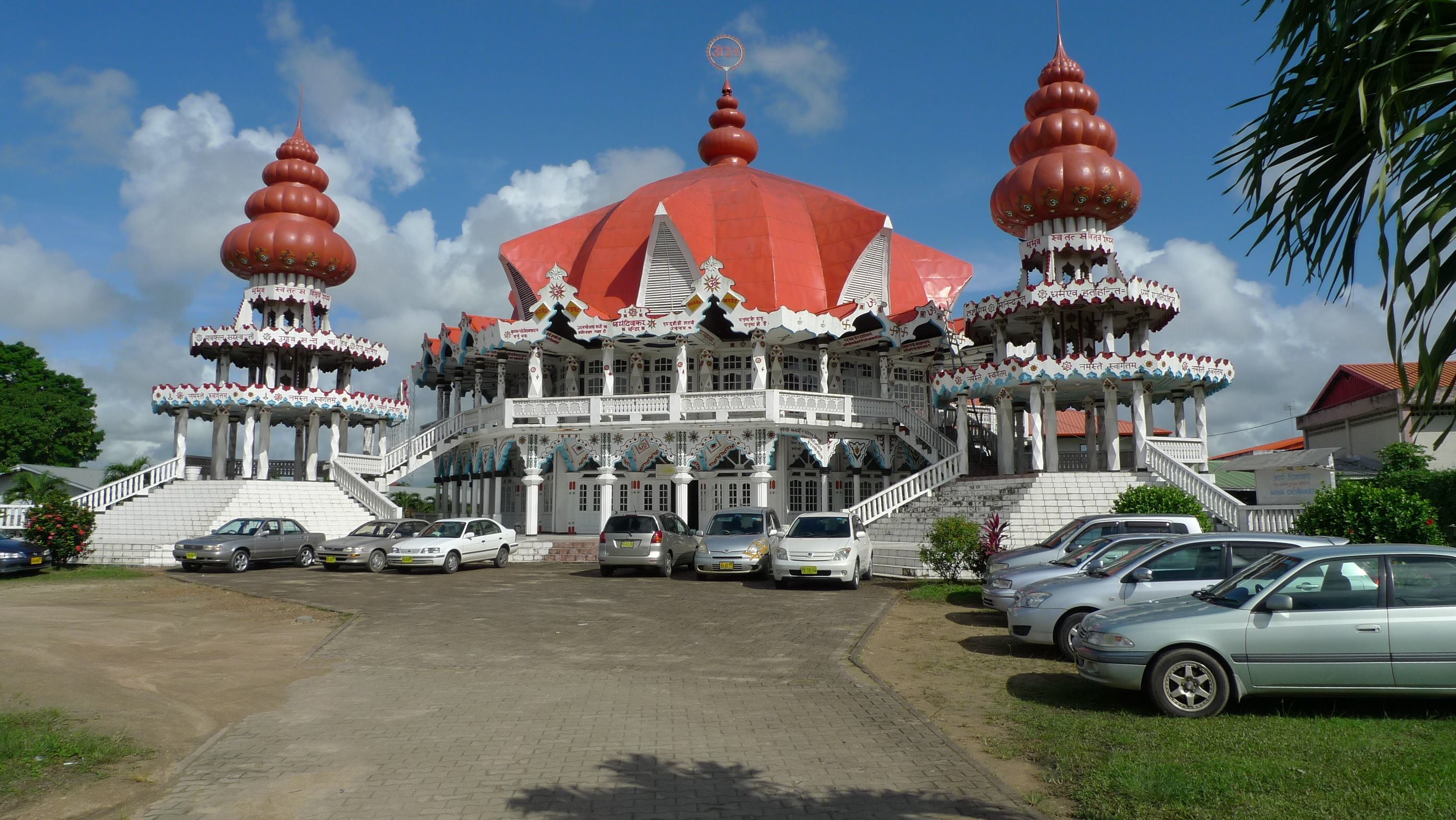 Foto van het exterieur van de Arya Dewakertempel in Paramaribo, Suriname